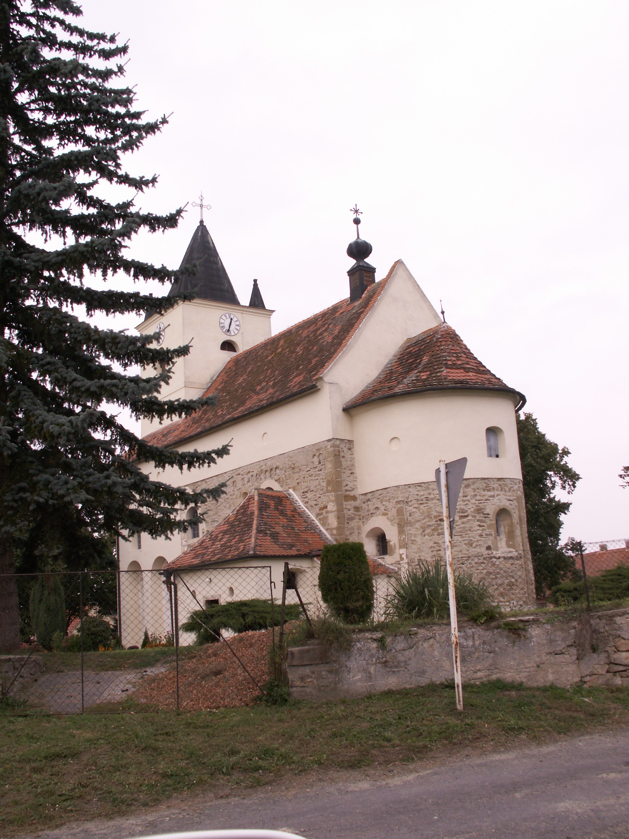 Mikulovice (okres Znojmo) - původně románský kostel z 12. století, sv. Petra a Pavla